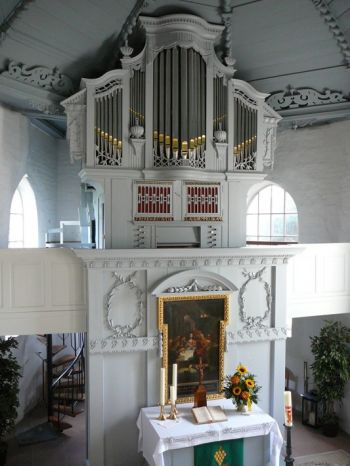 Wilhelmi-Orgel Altenesch von 1794/95